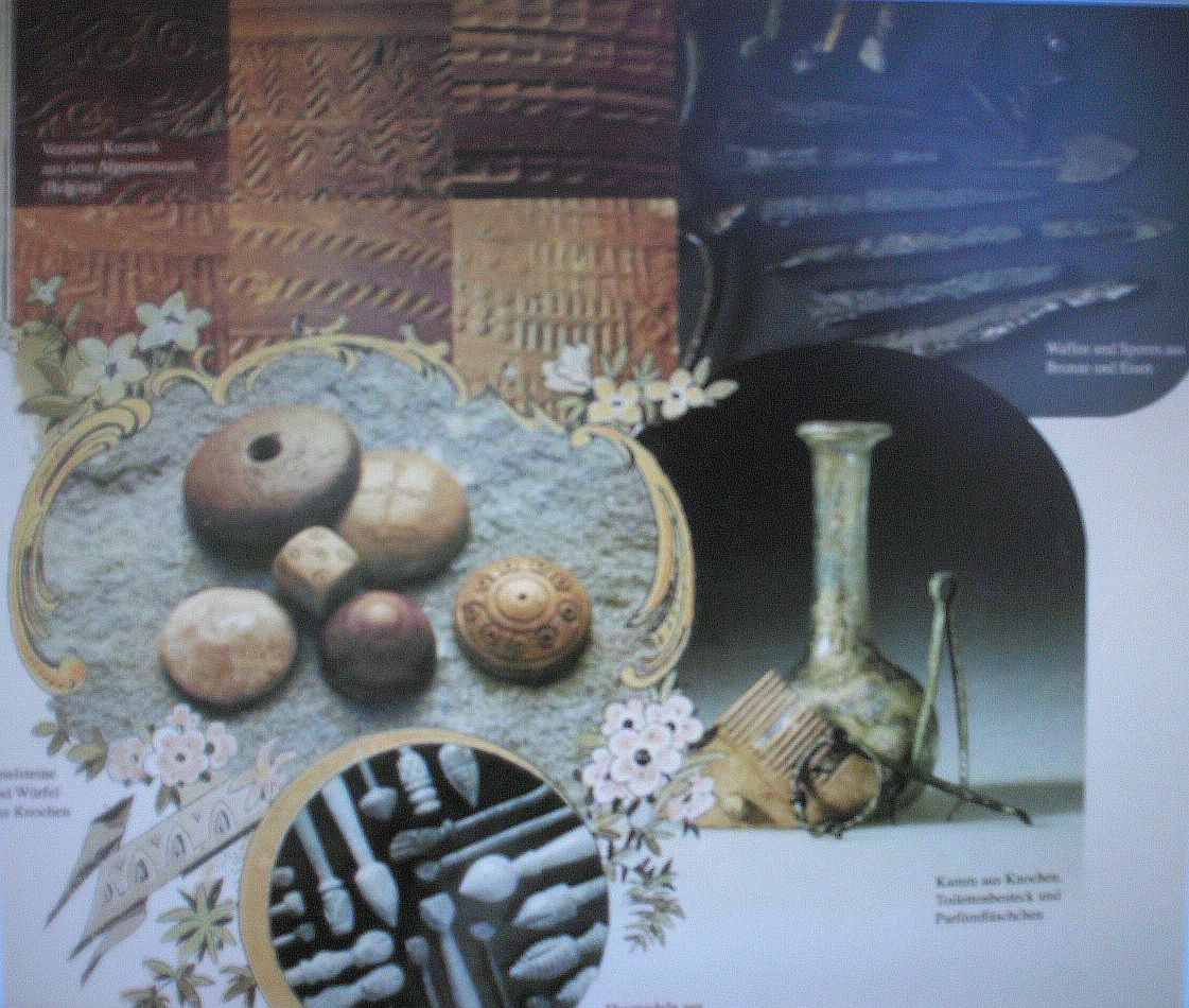 Fundauswahl der Kastellgrabungen in Pfyn (CH), Abbildung auf einer Infotafel vor Ort